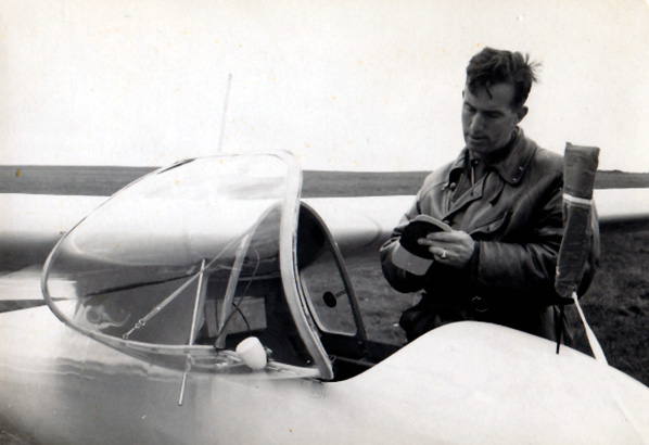 Otto Paul Koch bij de check van zijn zweefvliegtuig.